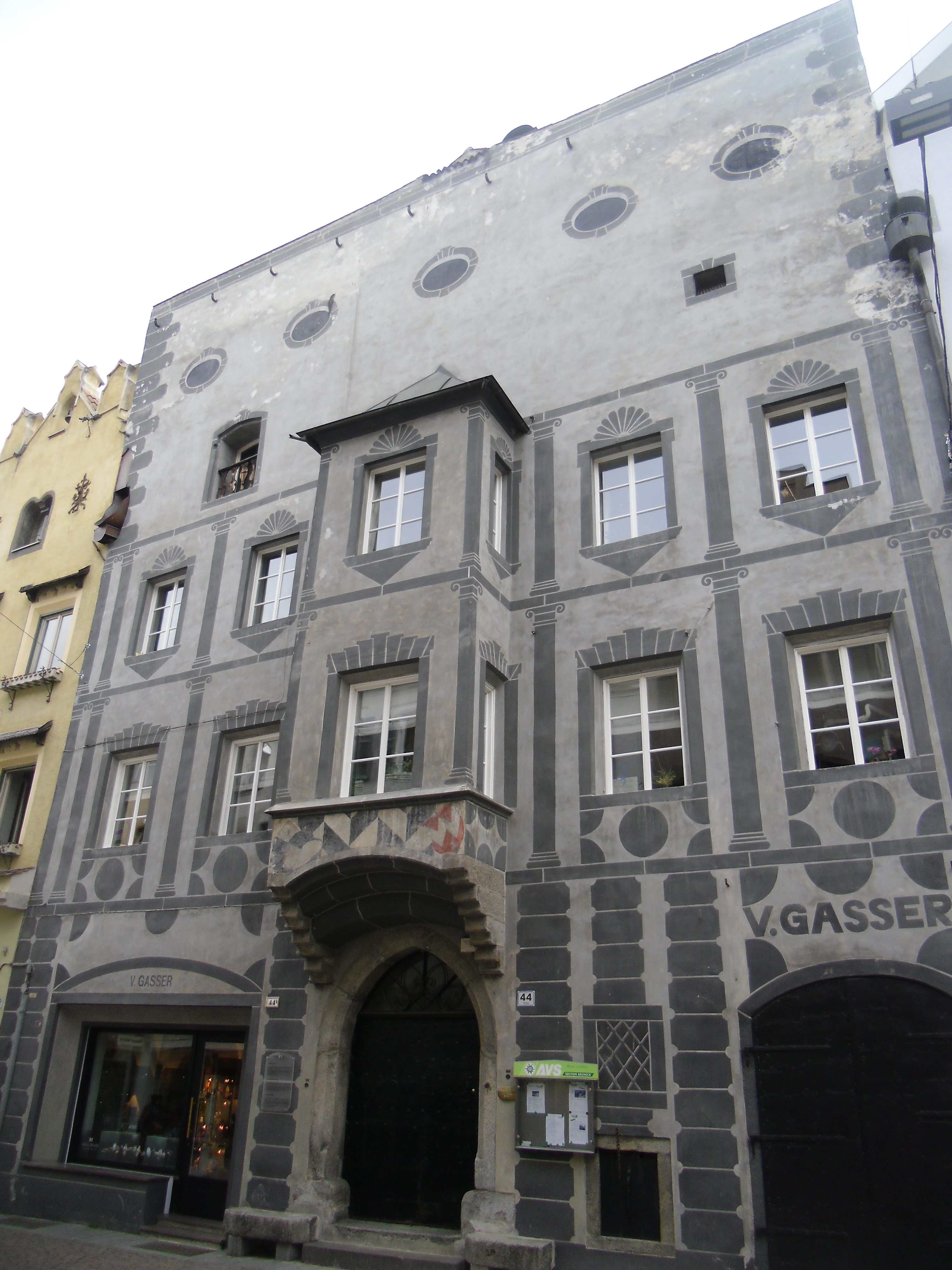 Strehlehaus, Stadtgasse 44 in Bruneck (Südtirol)